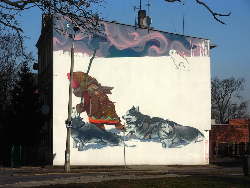 Mural na kamienicy na osiedlu Wzgórze Wolności w Bydgoszczy